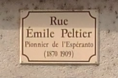 strato nomata laŭ la pionira esperantisto Émile Peltier en Villandry (Francio)